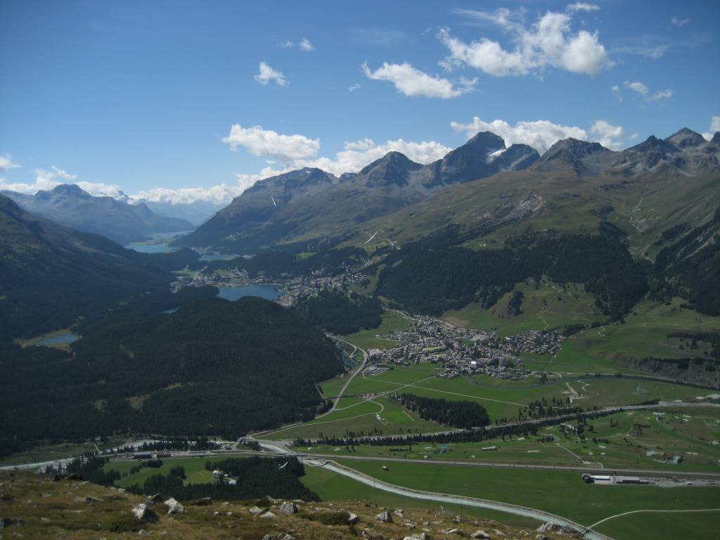 Blick auf Oberengadiner Seenplatte mit St. Moritz und Celerina